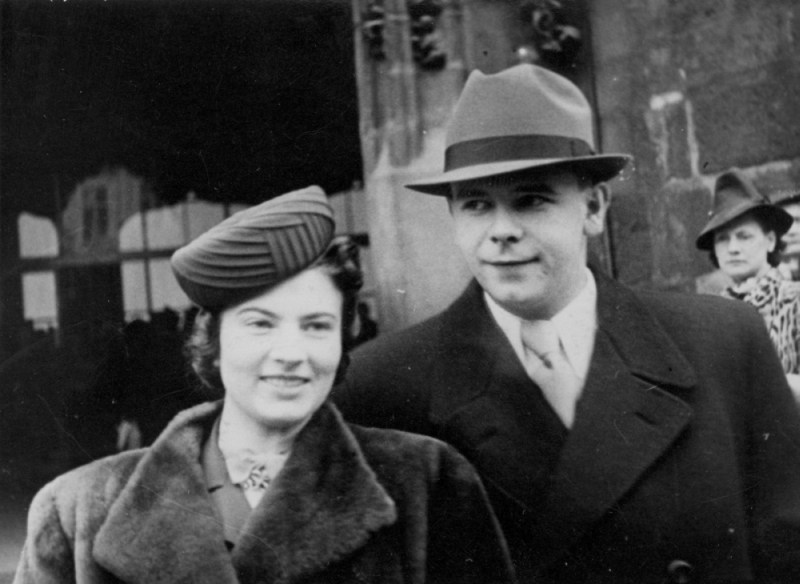 (Tato rubrika obsahuje fotografie z průběhu celého Broukova života, tzn. z let 1912-1978.)